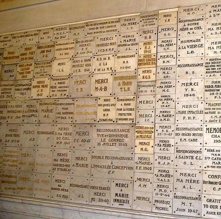 Ex-votos, Chapelle de la Médaille Miraculeuse, rue du Bac, Paris, 29-07-2006